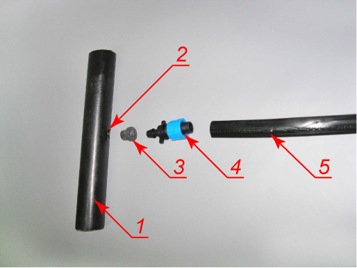 Как подключить капельную ленту